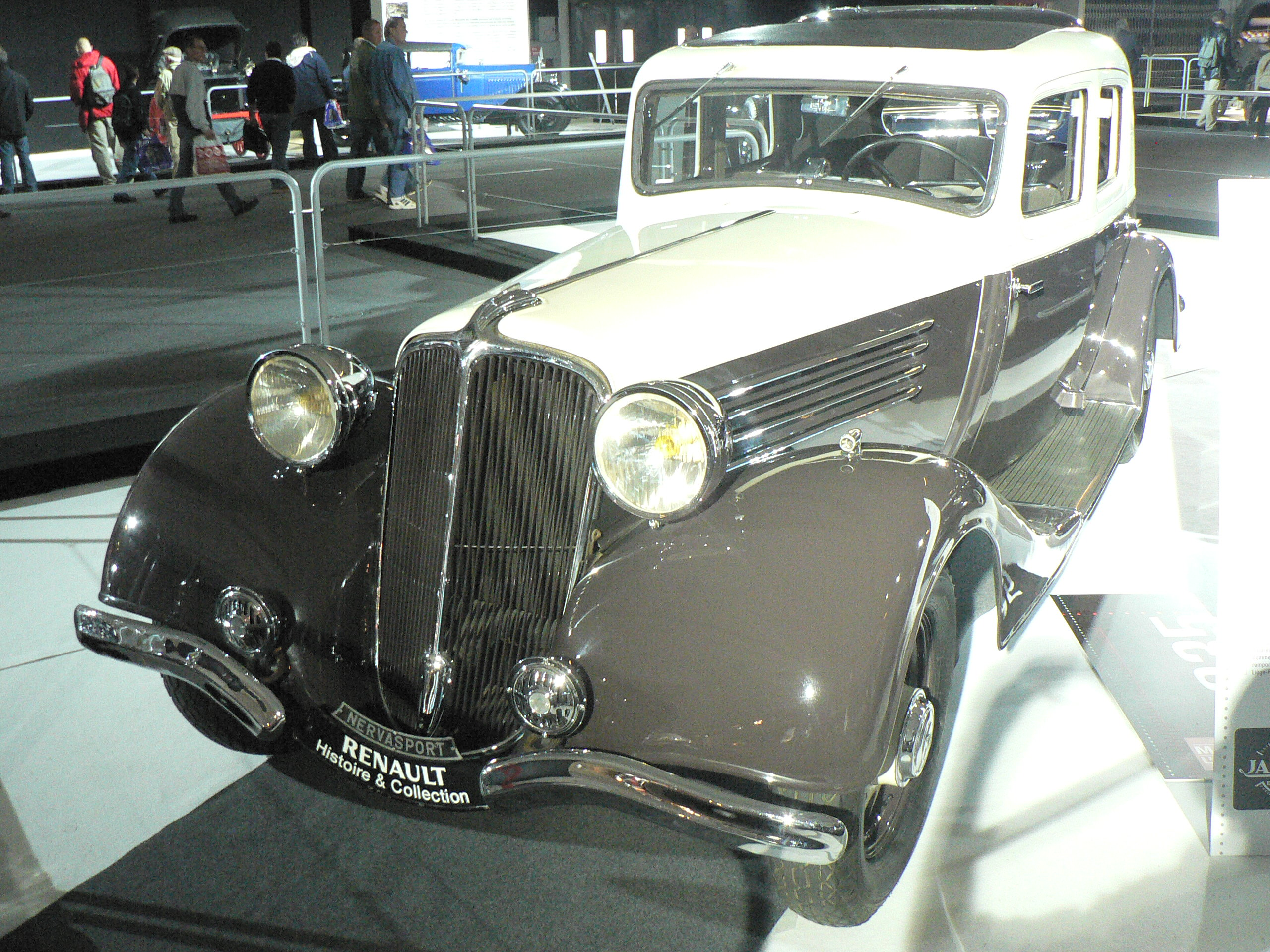 Mondial de l automobile de Paris (October 2006)